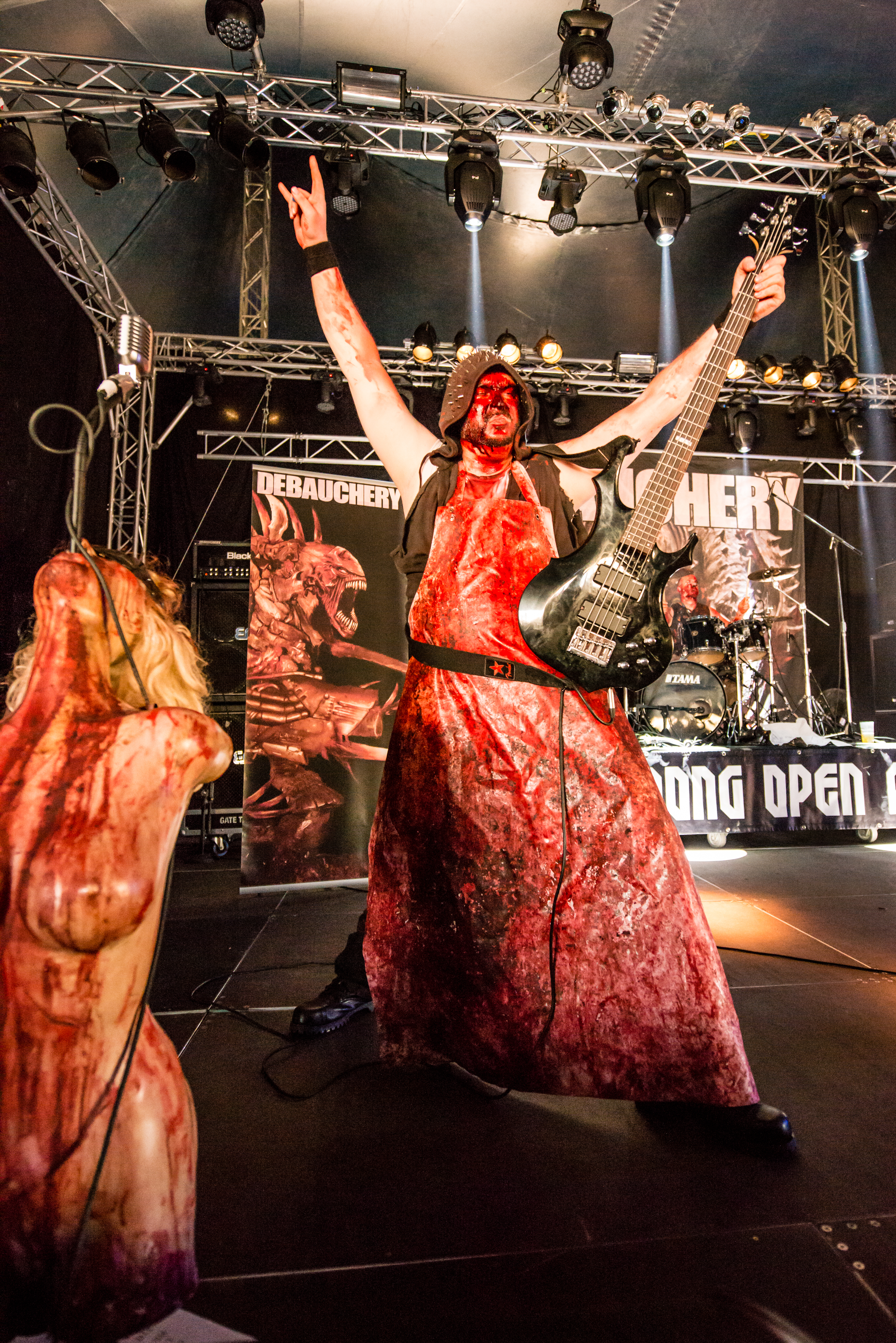 'Dong Open Air 2015; Neukirchen-Vluyn Halde Norddeutschland': 'Debauchery'